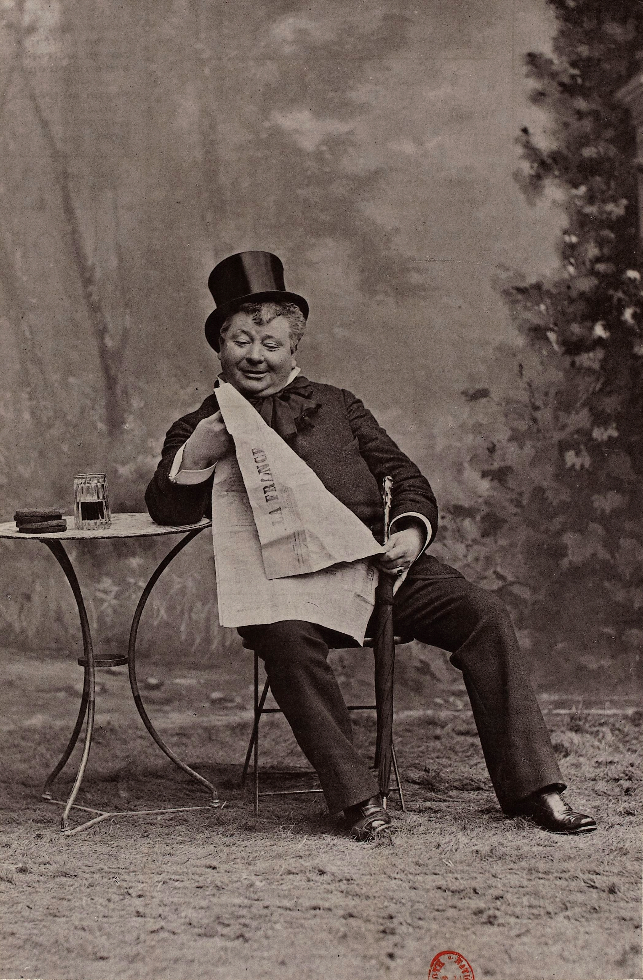 Photoglyptie de Daubray, photo Benque et Cie, Paris. Publiée dans Paris-Artiste, n°17, 12 avril 1884.